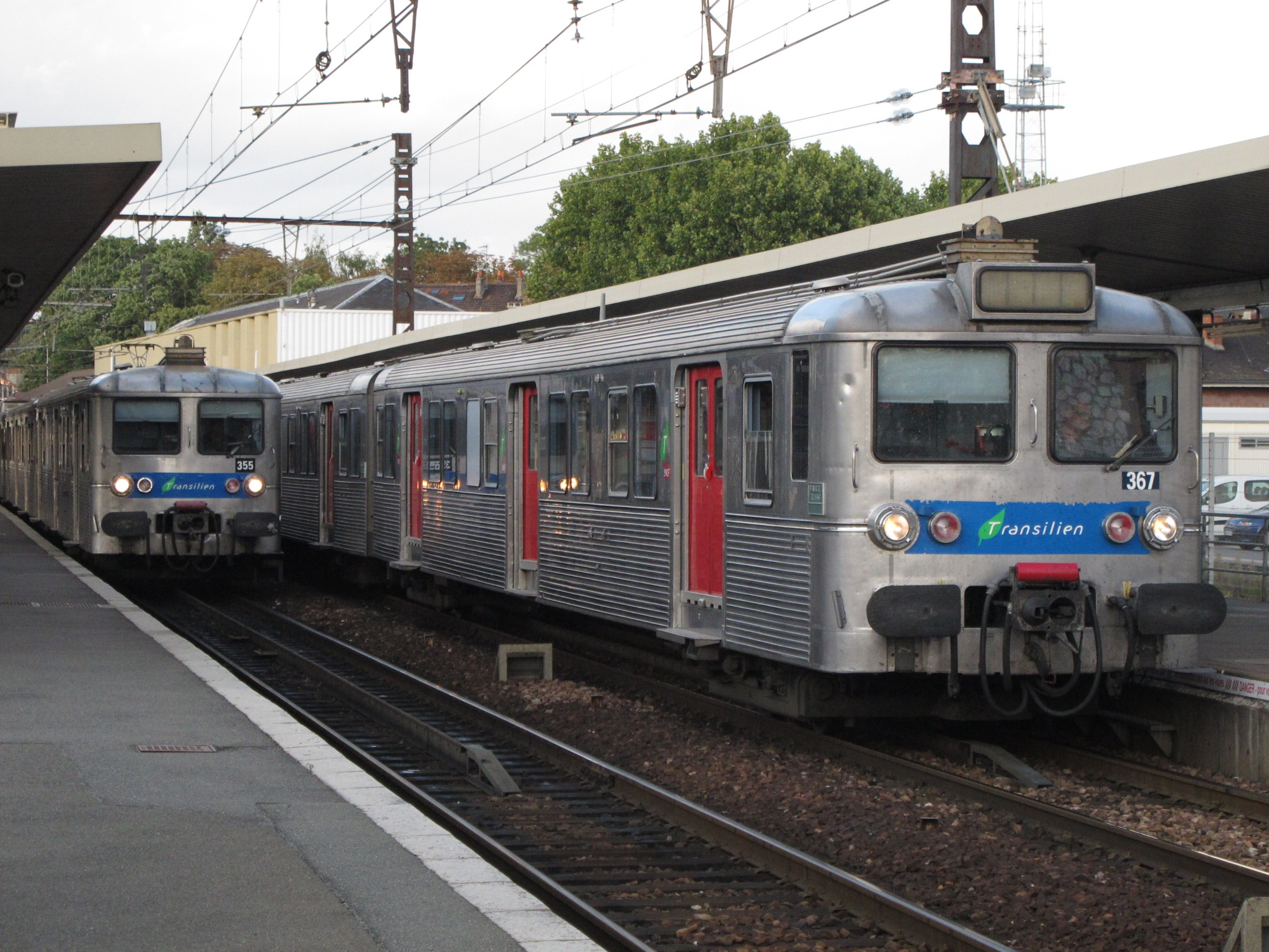 Rame Z5300, Gare de Corbeil-Essonnes, ligne D du RER, France